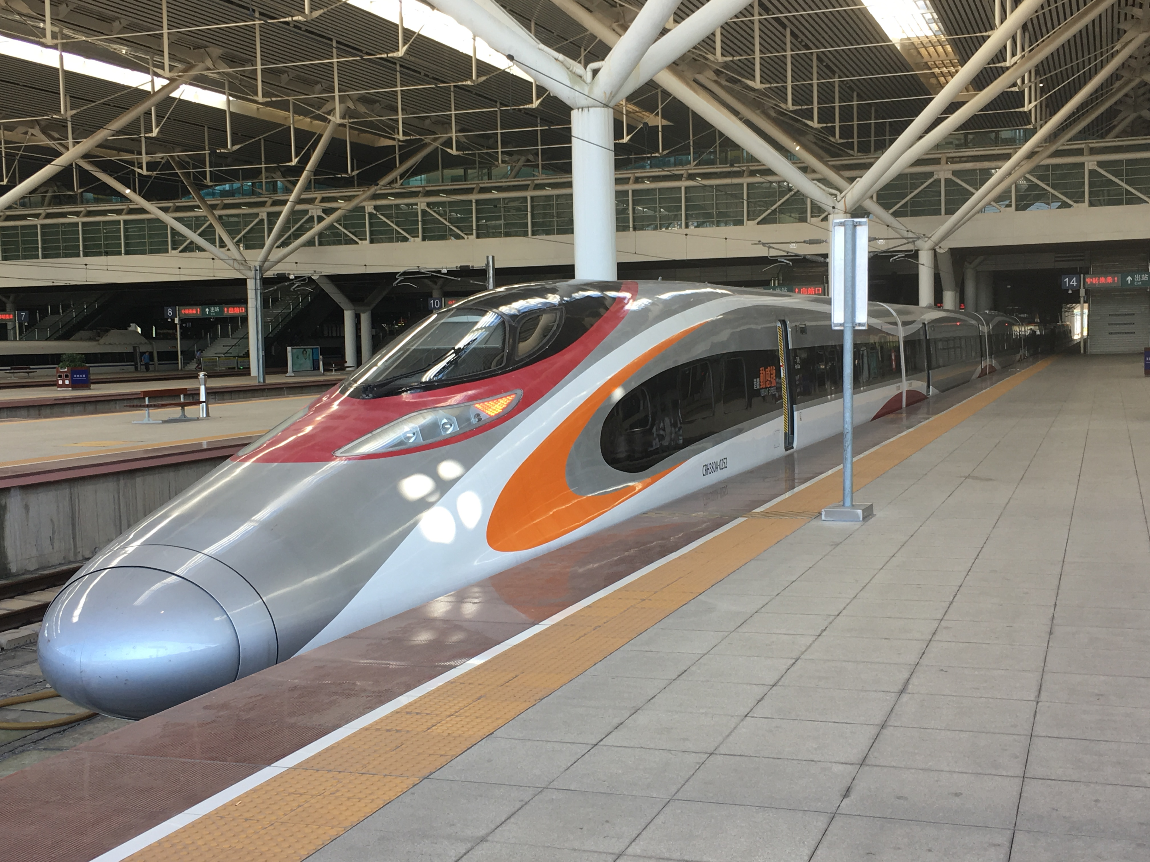 This photo is taken in Shenzhen North Station.